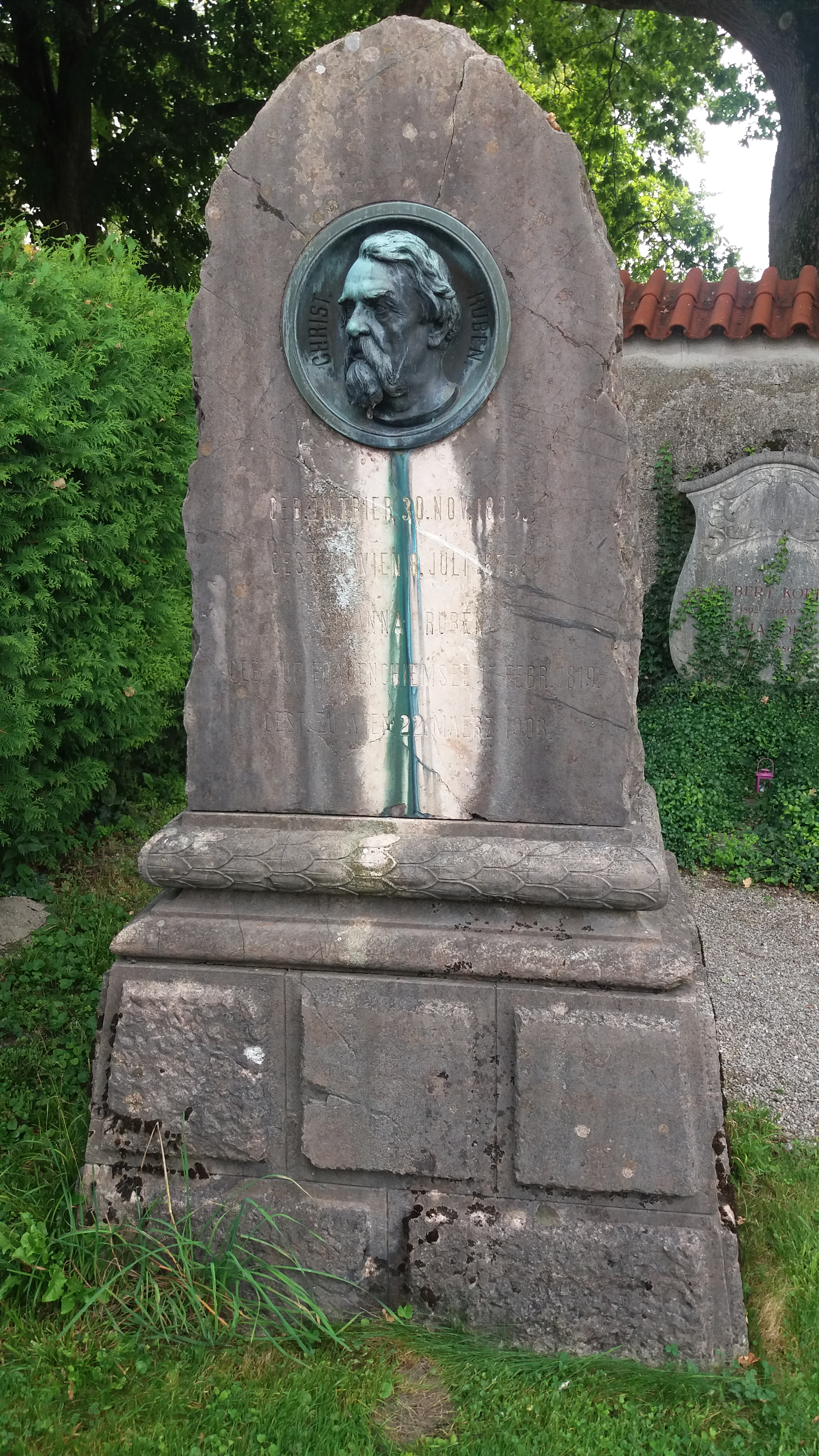 Grabstätte Christian Ruben auf dem Inselfriedhof Frauenchiemsee